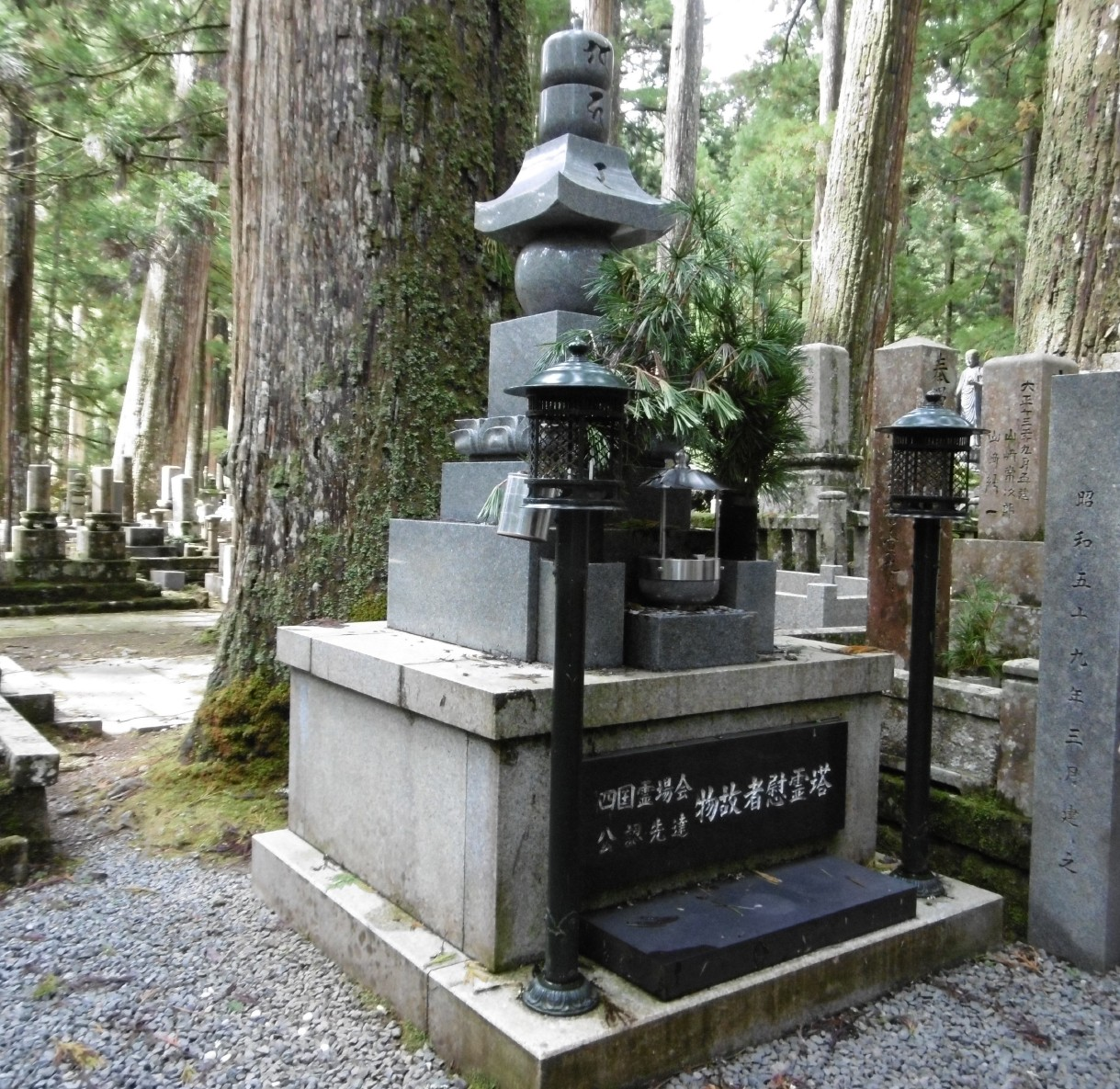 四国霊場先達供養塔